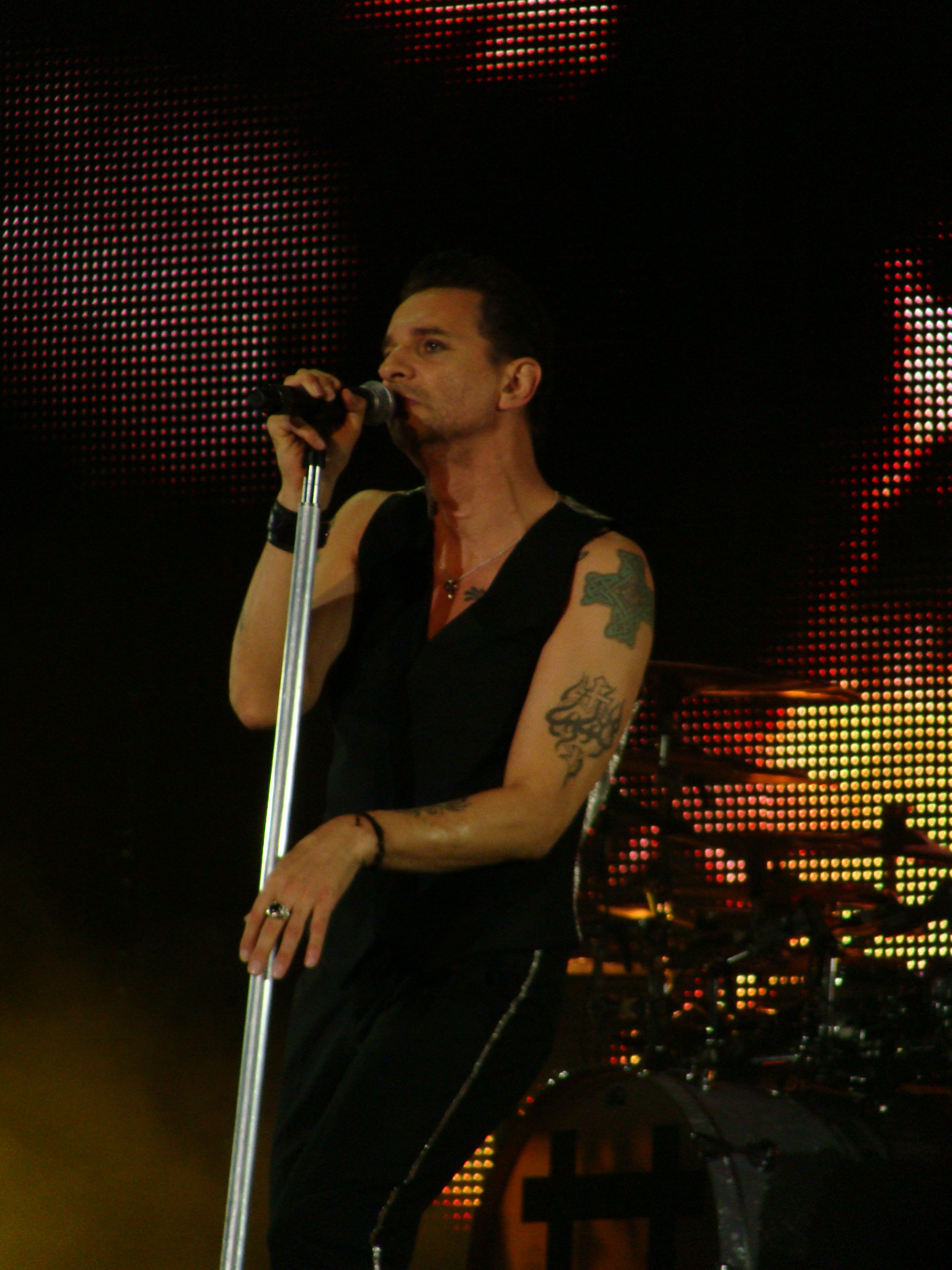 Dave Gahan en una actuación de Depeche Mode en el Bilbao BBK Live 2009.